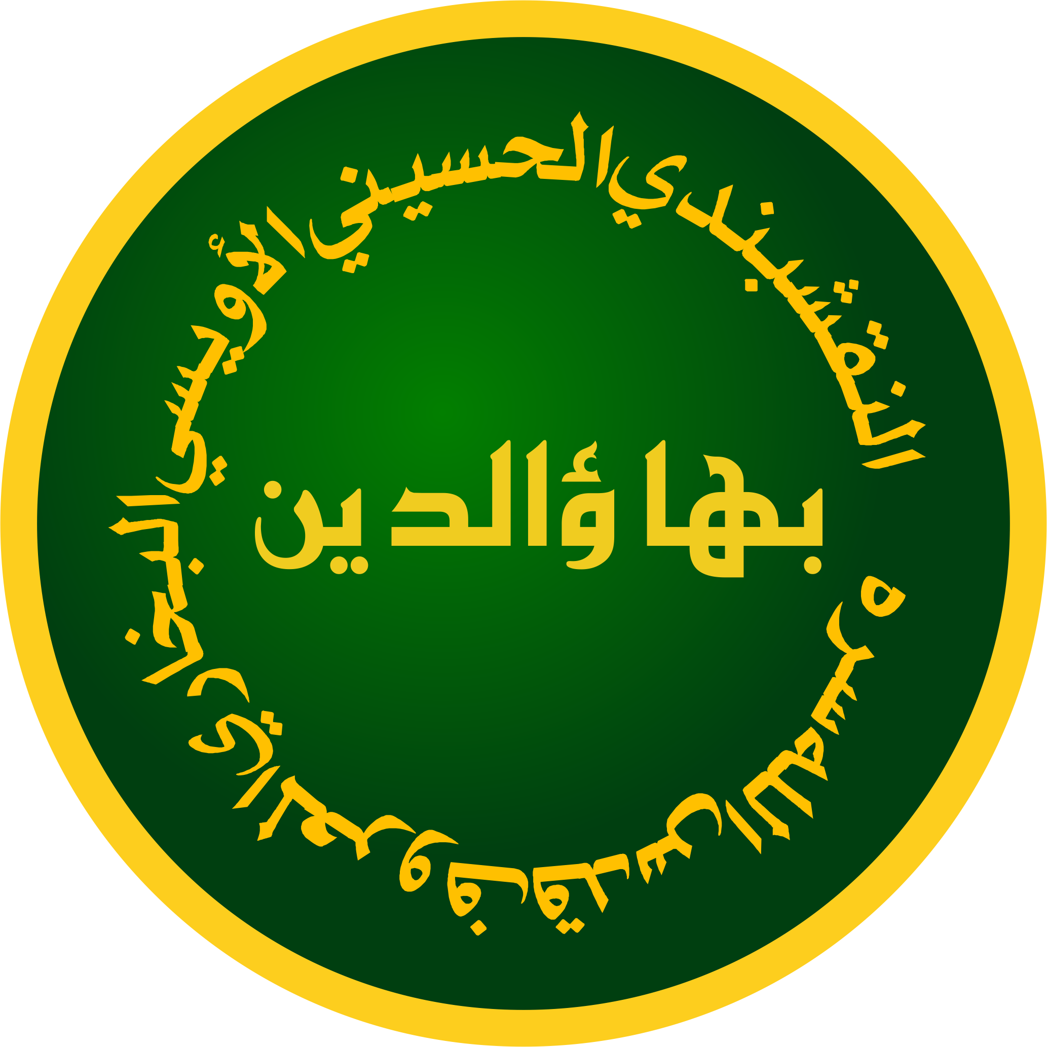 Naqsyabandiyah